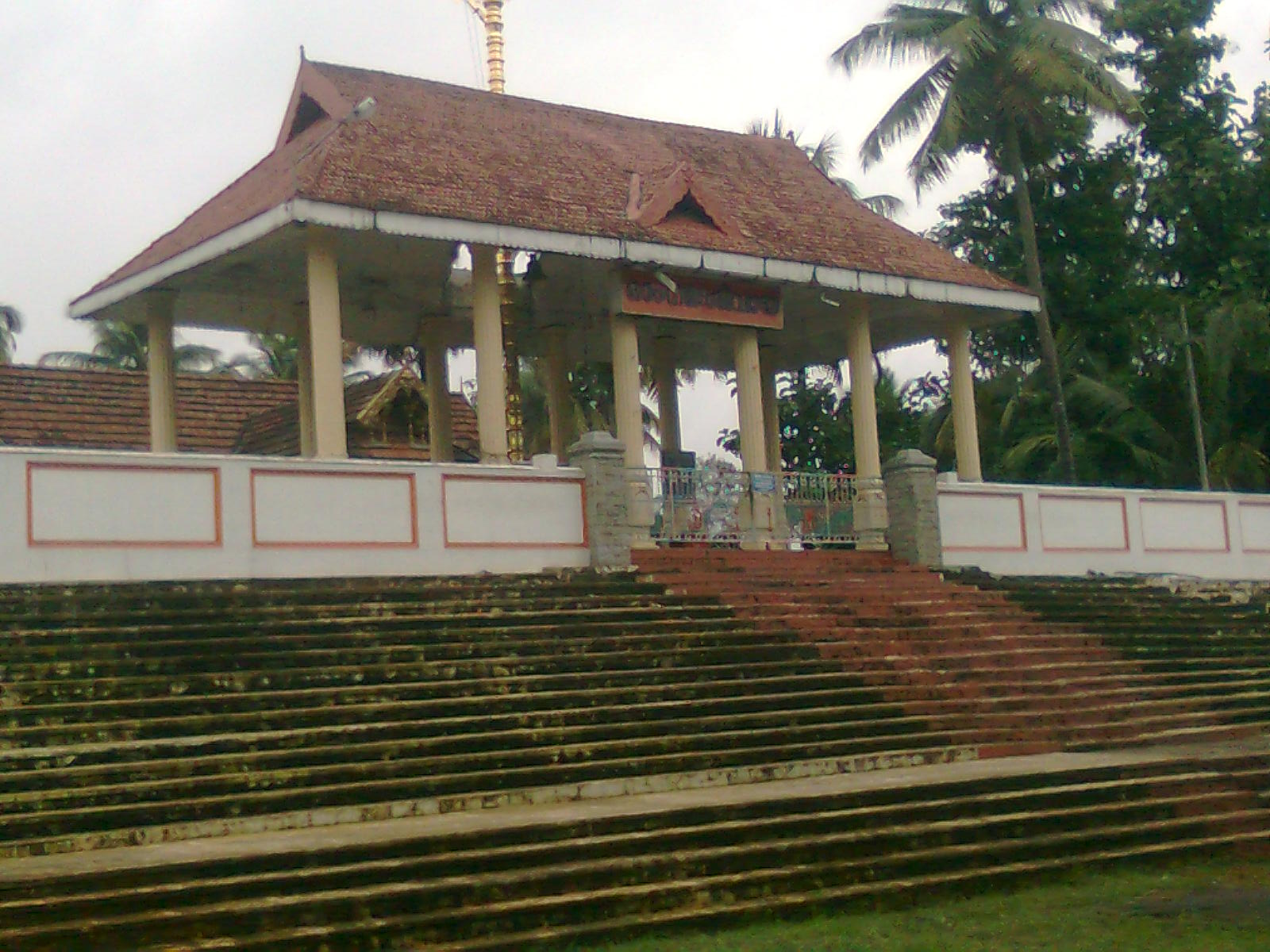 VelloorKunnam Mahadeva Temple Muvattupuzha